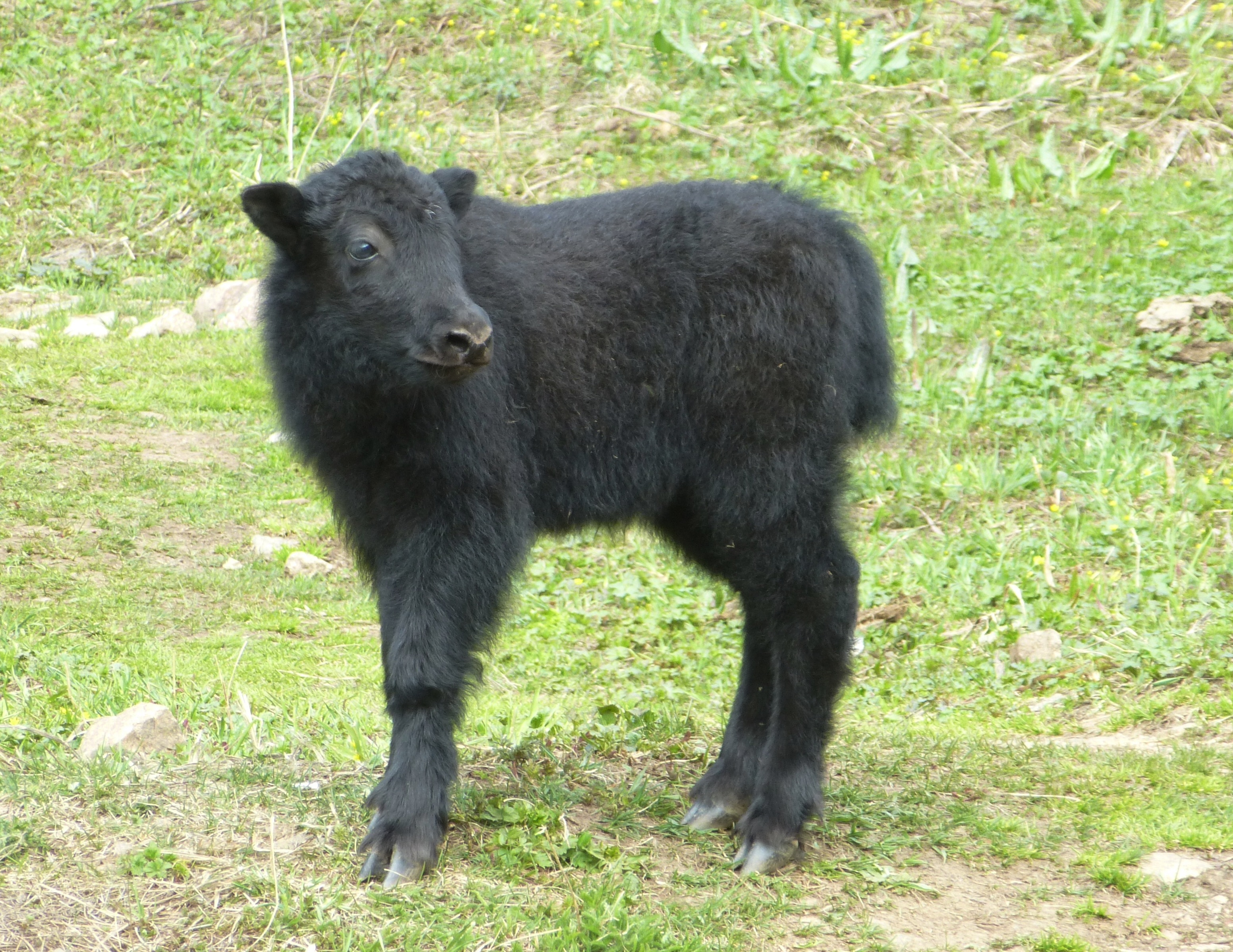 Телёнок яка к в горах Заилийского Алатау. Ущелье Ким-Асар. Окрестности Медео. Май 2014 года.